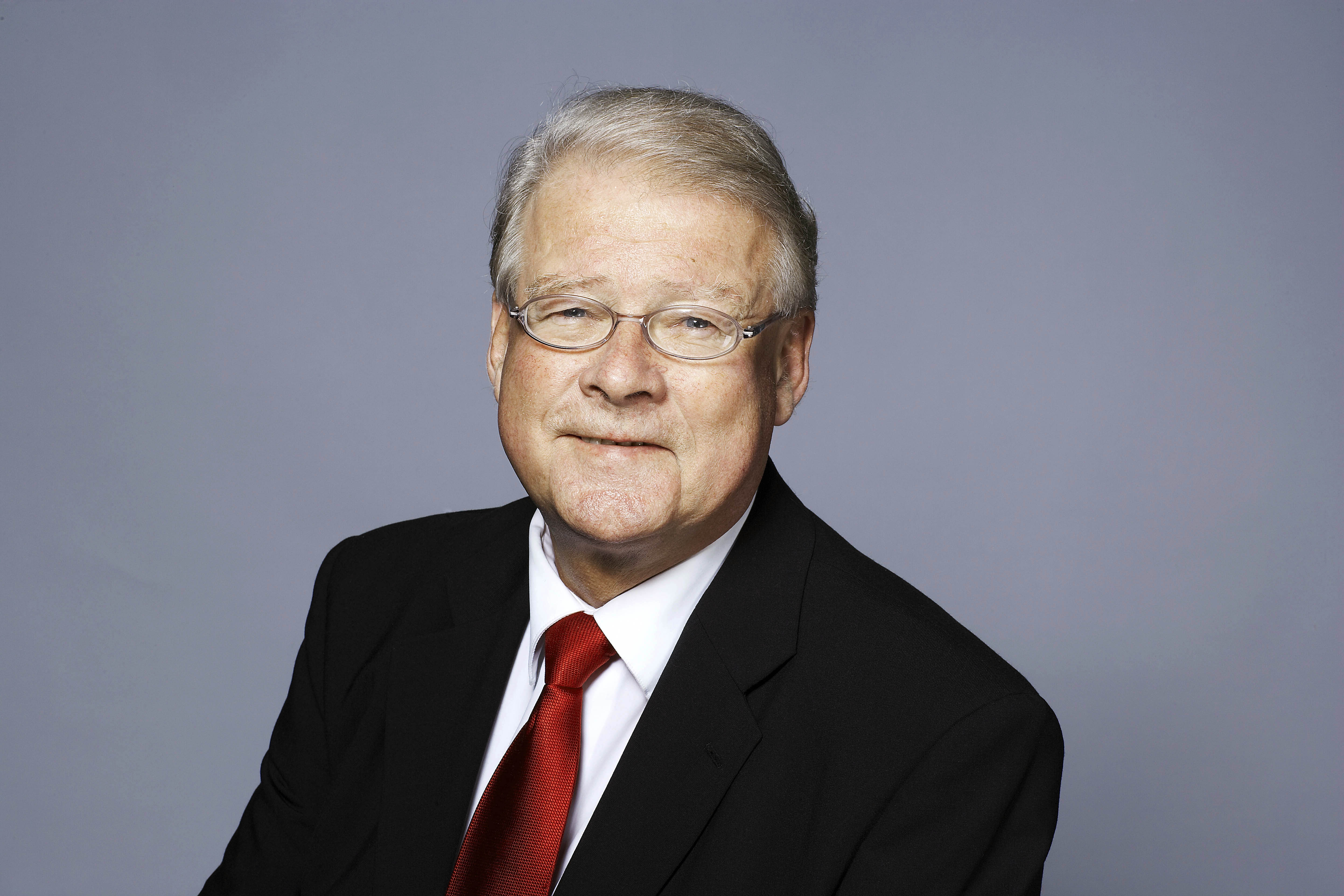 Carl I. Hagen, FrP-politiker